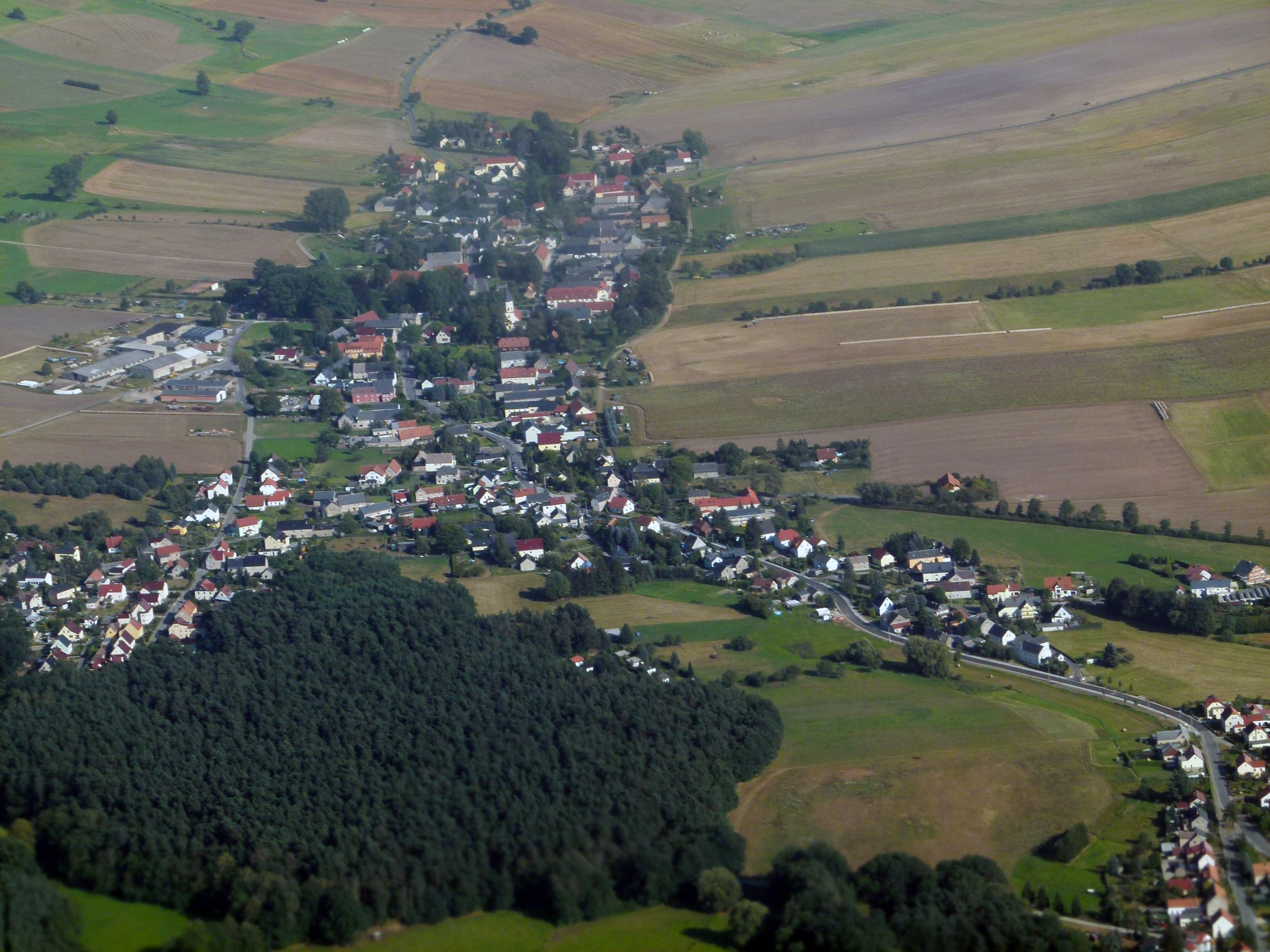 Blick auf Lomnitz (Wachau), Sachsen